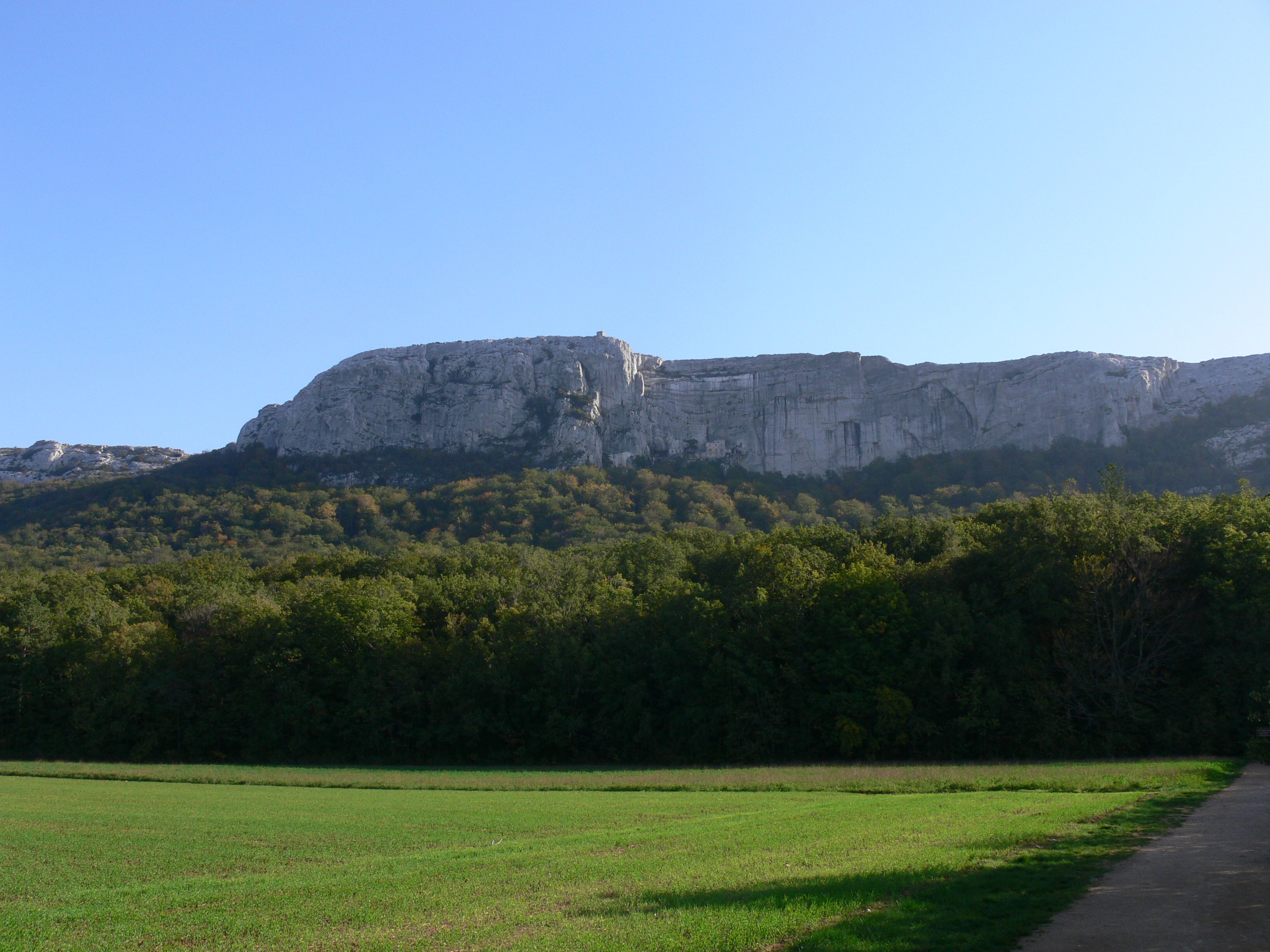 Massif de la Sainte-Baume (Var, France), versant Nord. Au premier plan, la hêtraie.